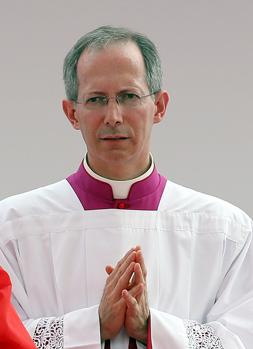 Guido Marini lors du voyage du pape François en Corée du Sud en août 2014 This file has been extracted from another file: Messe de béatification Corée 2014.jpg